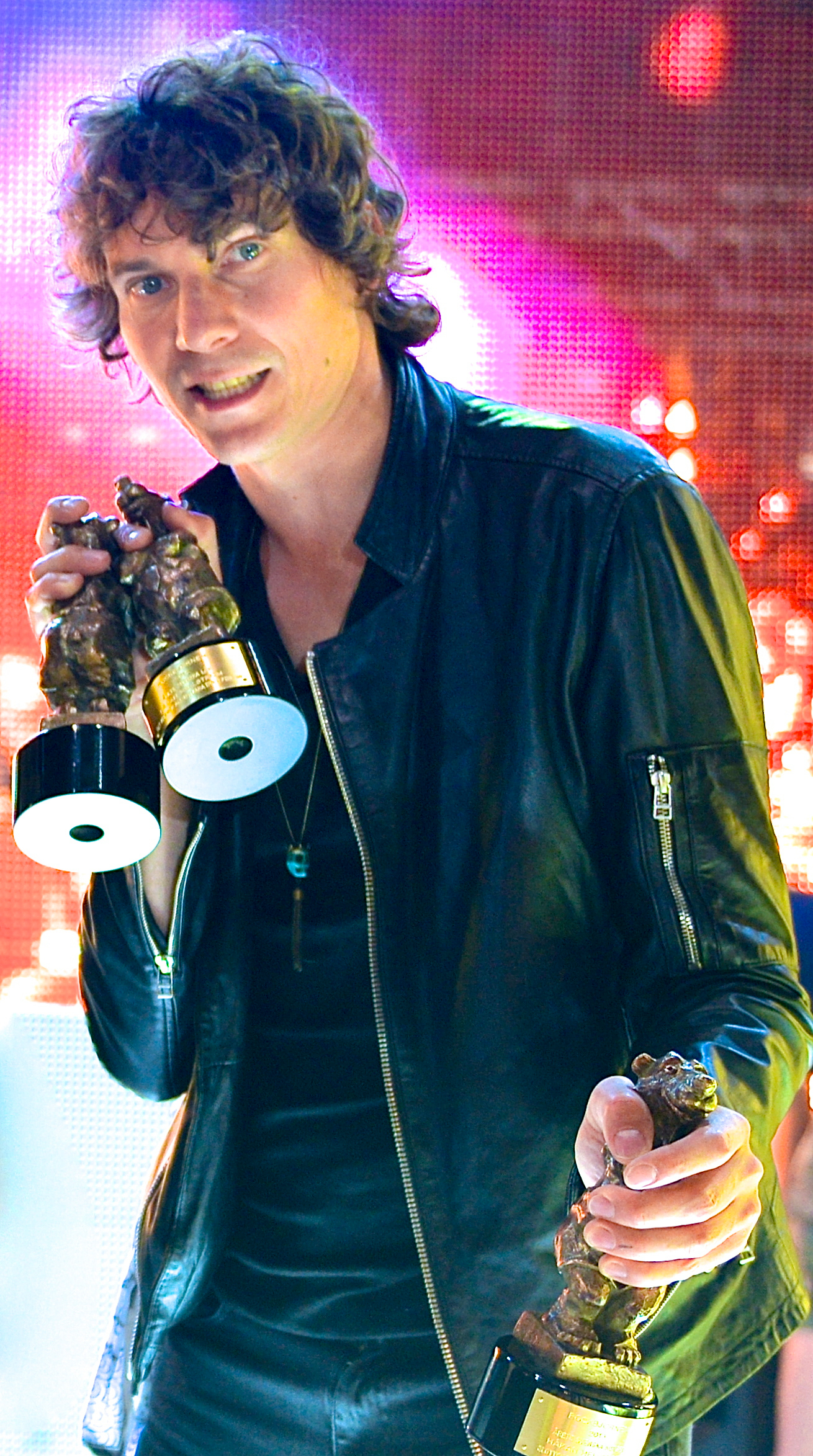 Rockbjörn-vinnaren Håkan Hellström den 28 augusti 2013 på Gröna Lund i Stockholm.